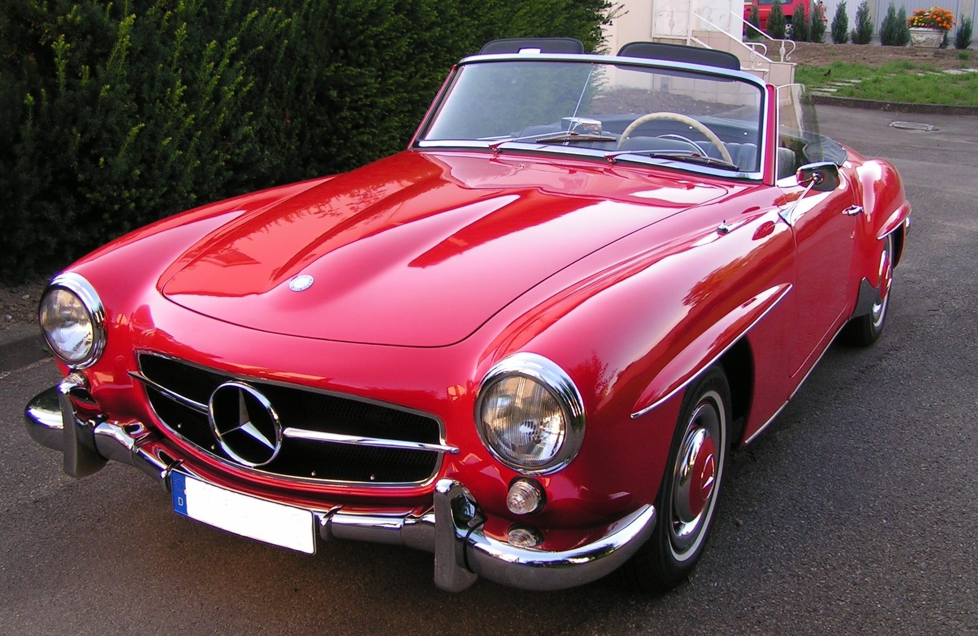 190 SL Roadster (Bj. 1962) in feuerwehrrot